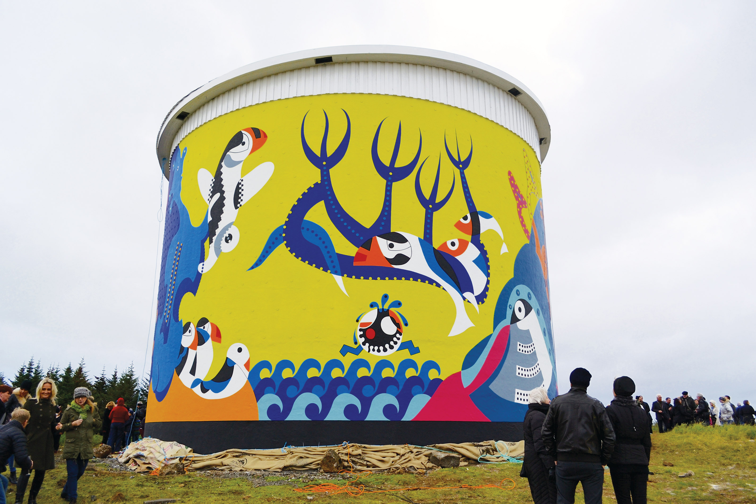 Onthulling van Uppspretta